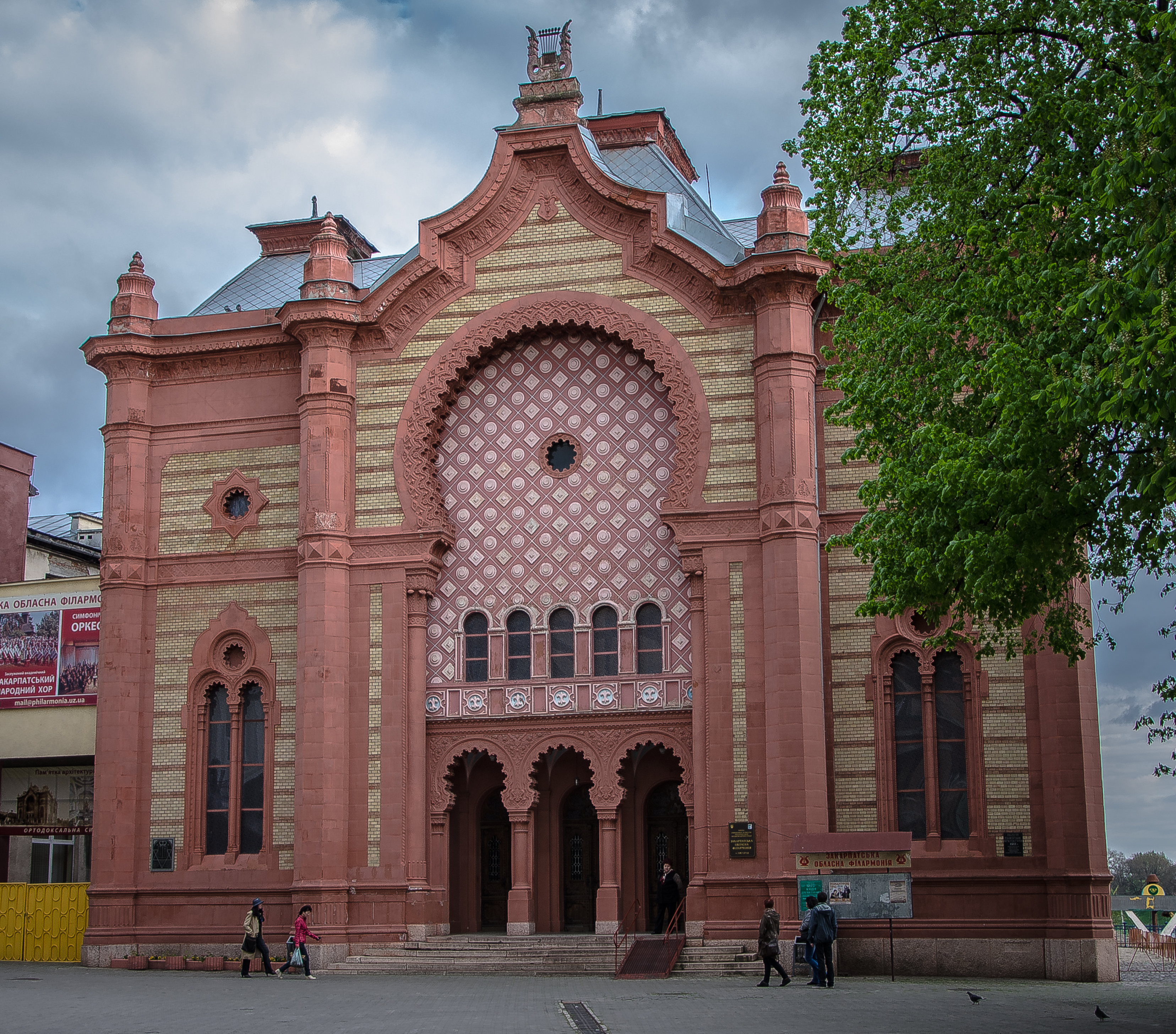 Синагога (мур.), Ужгород, пл. Театральна, 10